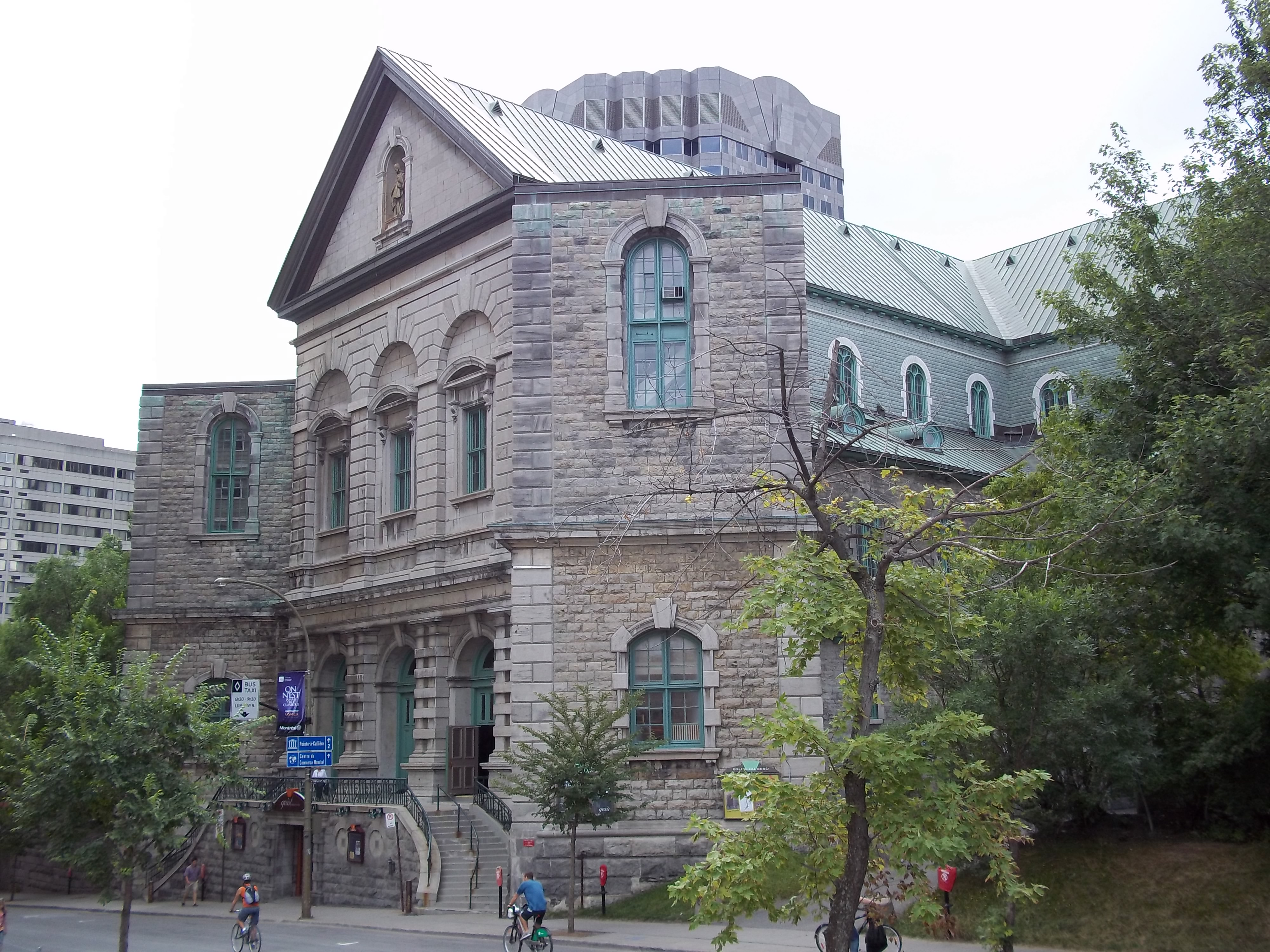 Église du Gesù, rue Bleury, Montréal (info)